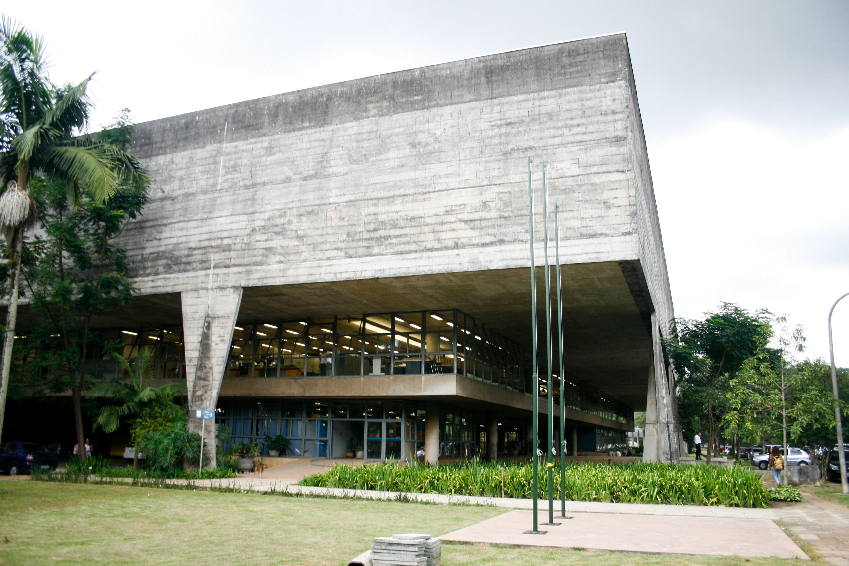 Rua do Lago, 876, Cidade Universitária. Foto por Felipe Lavignatti para o Arte Fora do Museu (